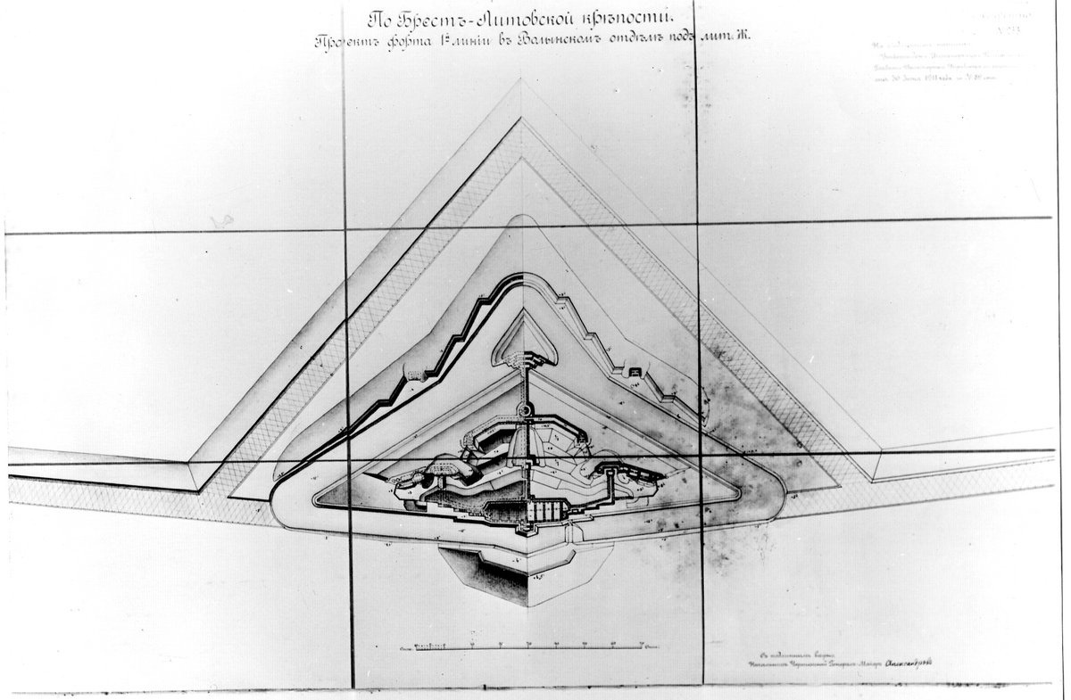 Проект форта "Ж" ("Дубинники"), составленный капитаном Иваном Осиповичем Белинским.